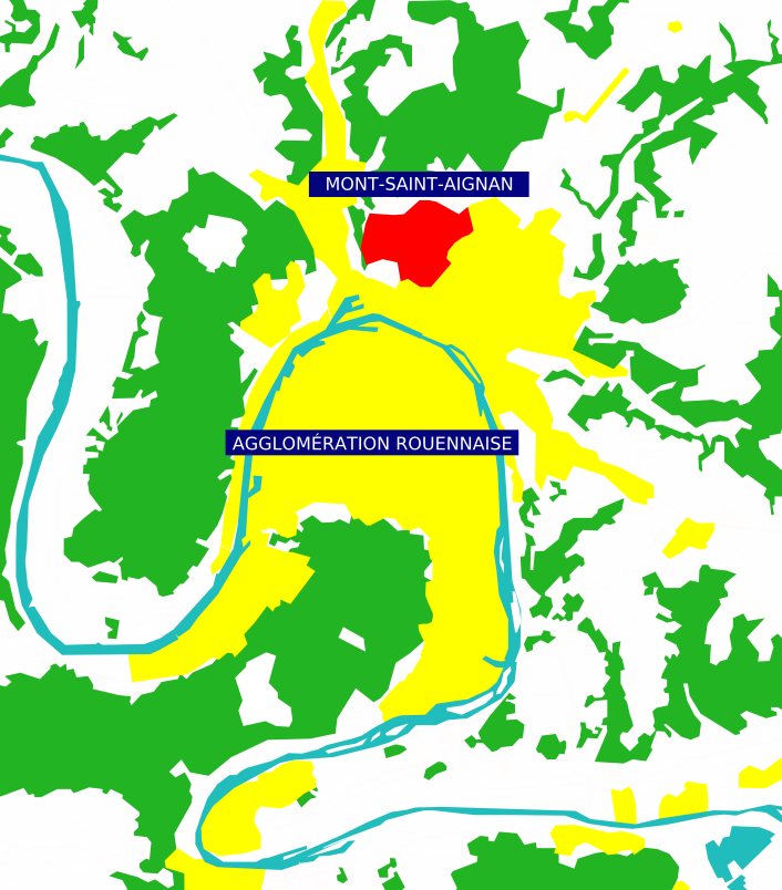 *Situation géographique de Mont-Saint-Aignan par rapport au reste de l'agglomération rouennaise. Graphique entièrement réalisé par moi-même, Kuxu, grâce au logiciel Inkscape, principalement à l'aide de la fonction « courbes de Béziers ».